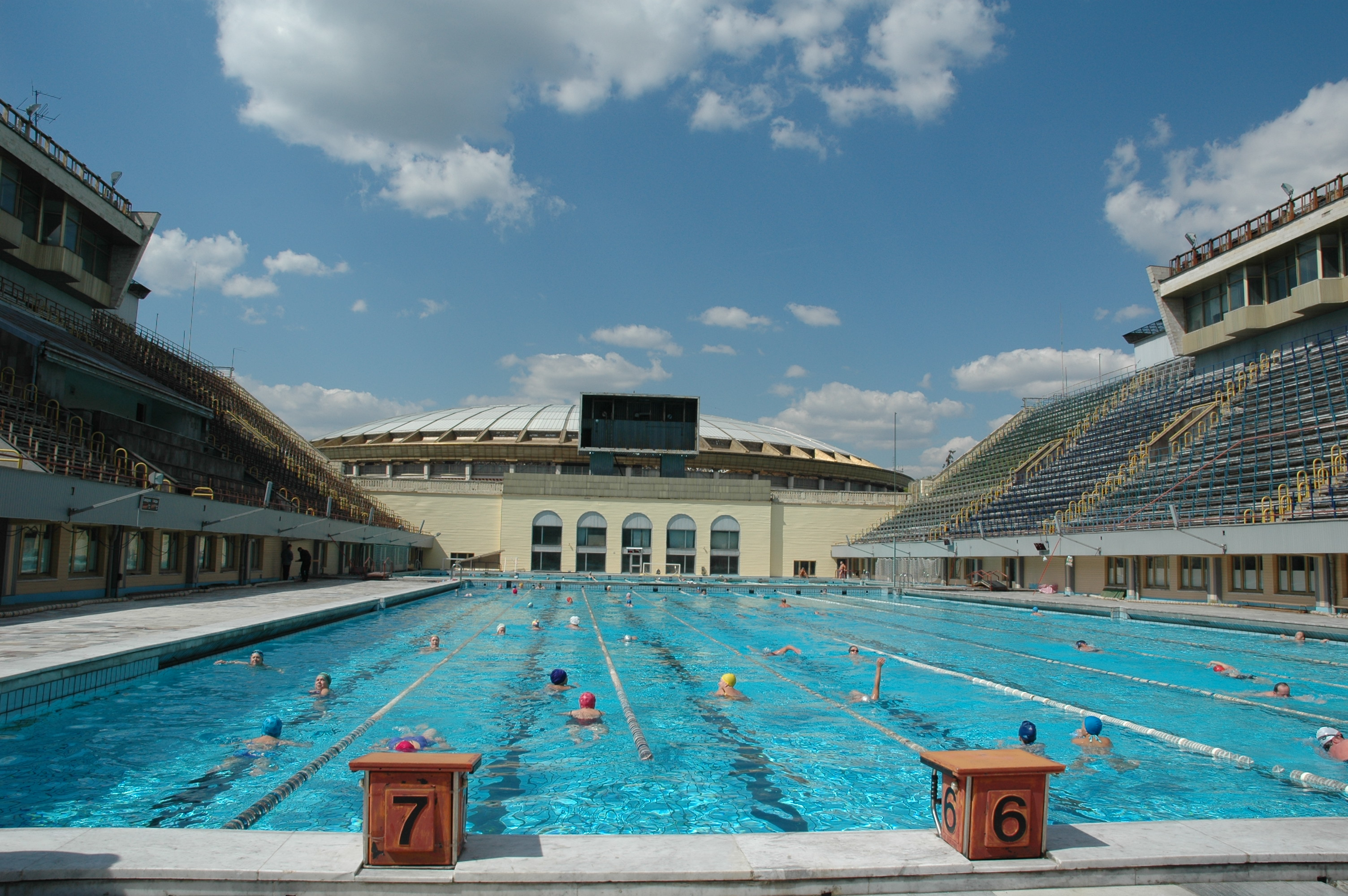 Открытый бассейн в комплексе "Лужники"